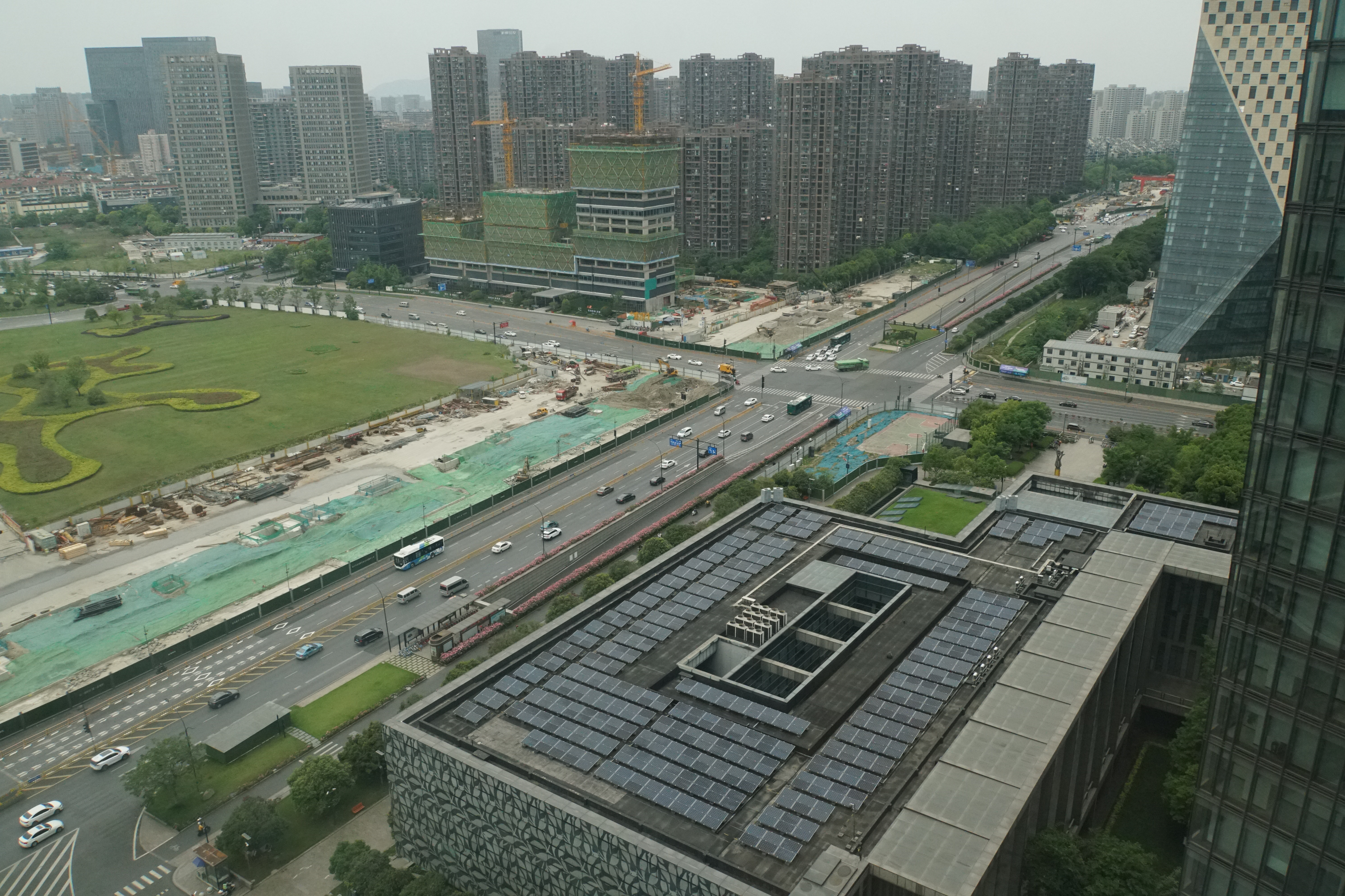 20200508中央公园站工地